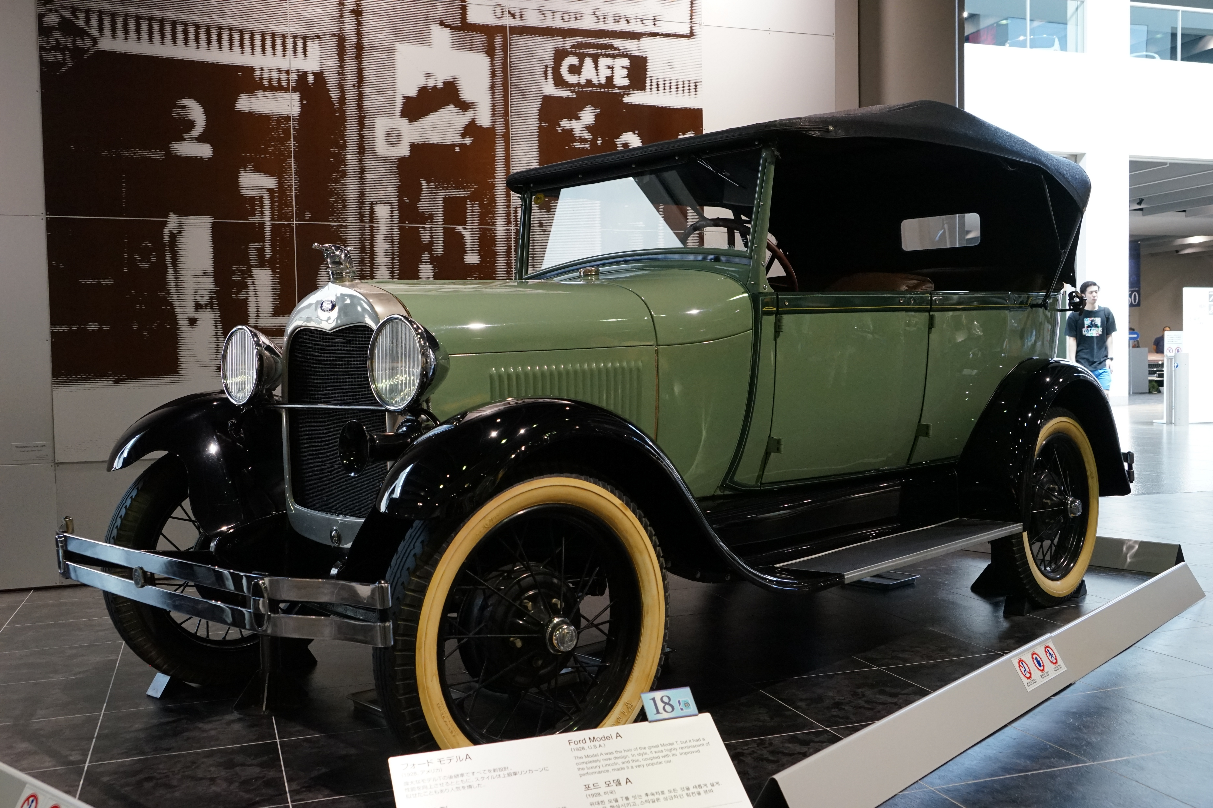 2015年9月19日、トヨタ博物館にて本人撮影